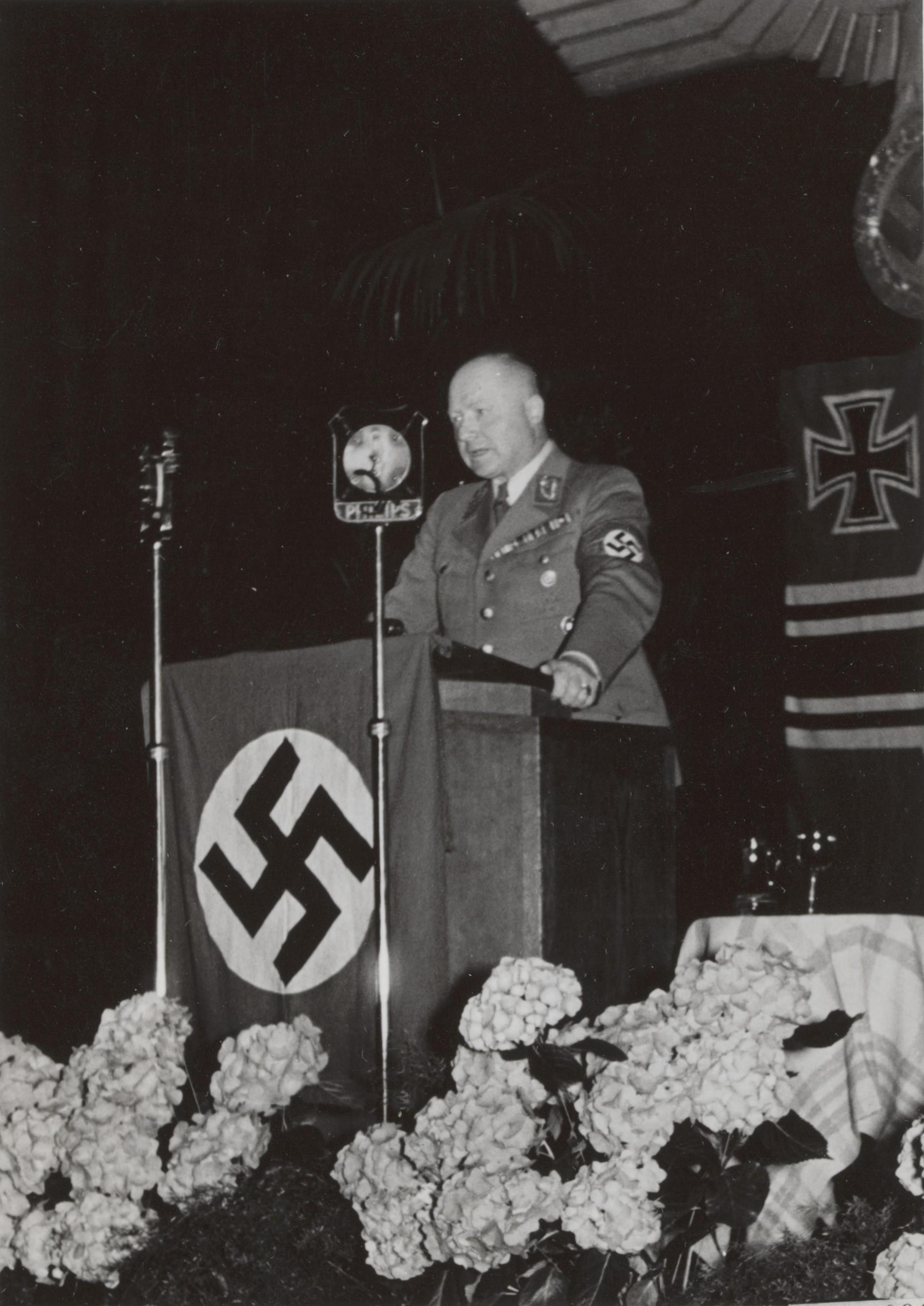 Gauleiter van Hessen-Nassau en commissaris van Rijksdefensie Jakob Sprenger sprak op 8 juni 1941 te Amsterdam tot de civiele medewerkers van de Duitse Wehrmacht